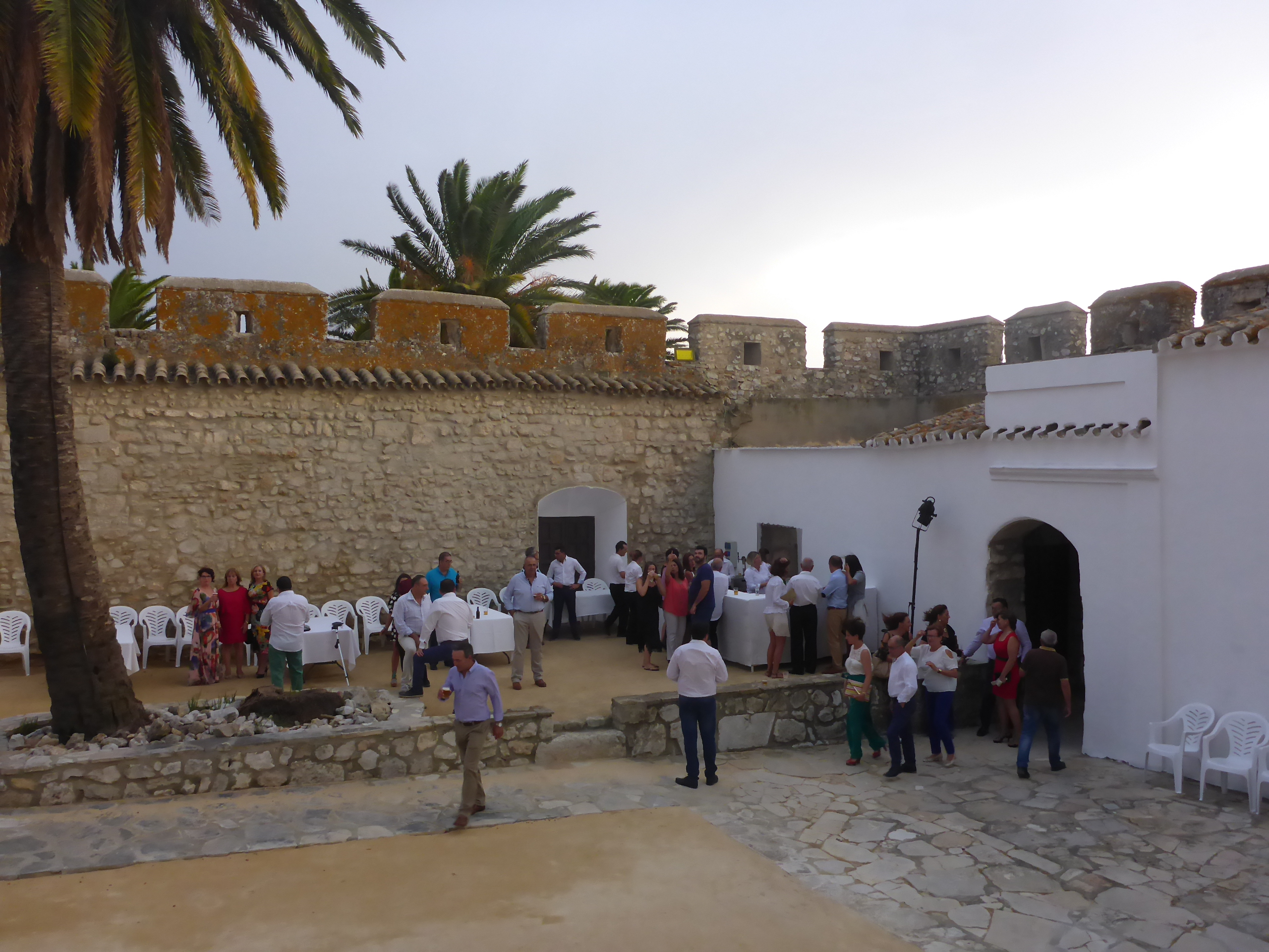 2ª noche medieval en el Castillo de Gigonza